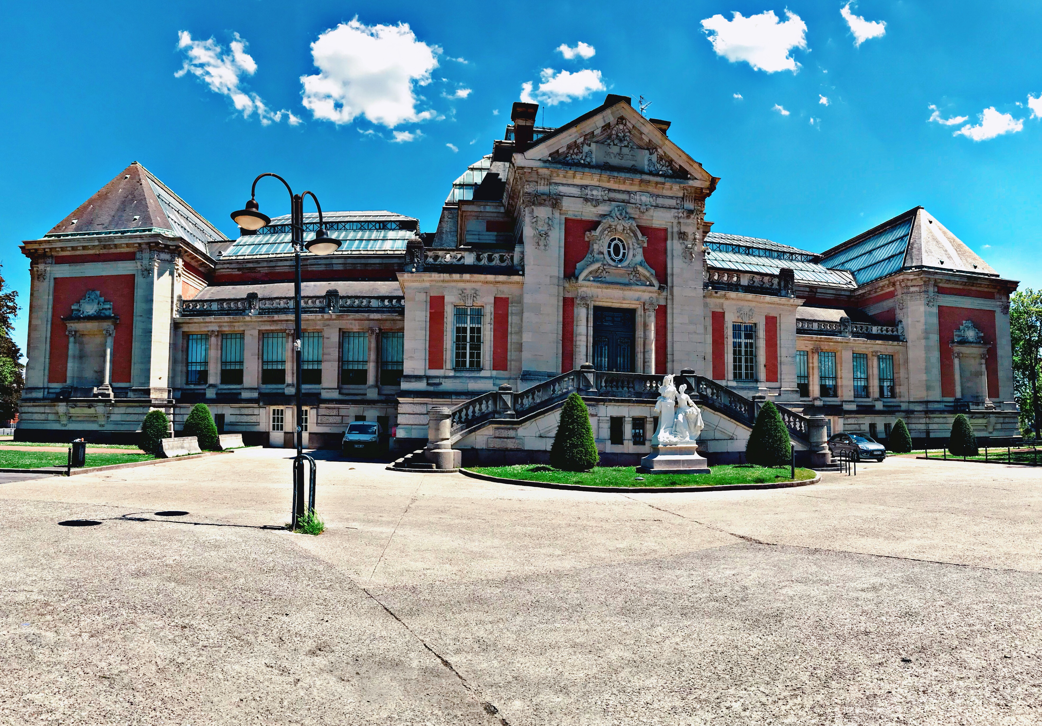 Valenciennes, Frankrijk, June 2019